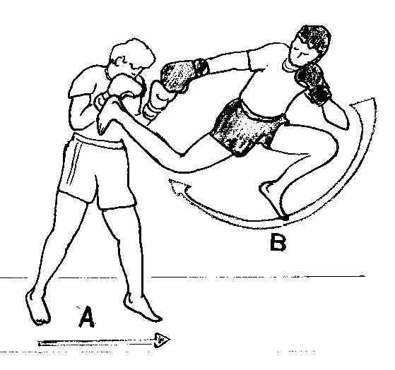 jump_back.jpg